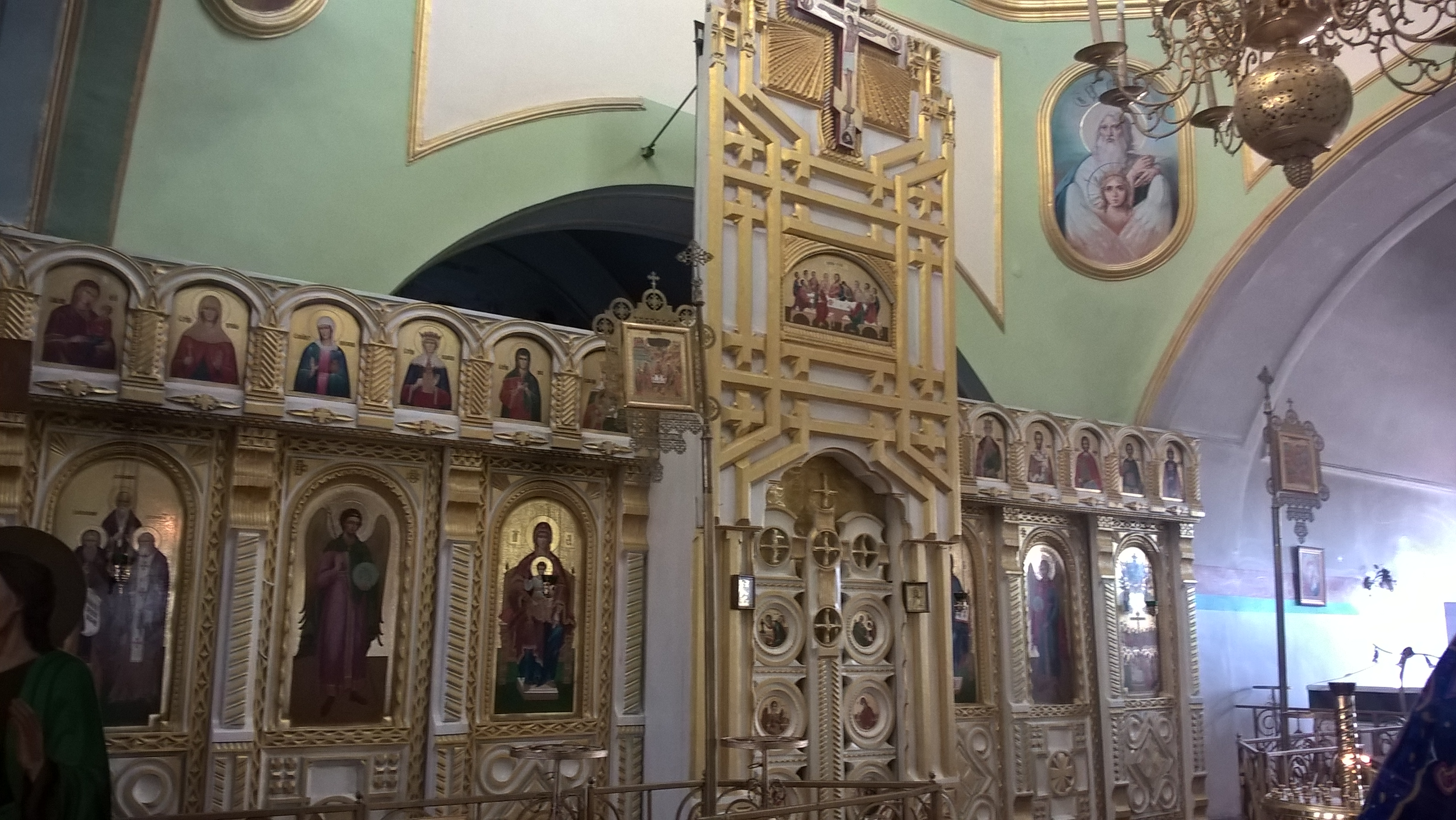 Wnętrze cerkwi Wszystkich Świętych w Dubosarach